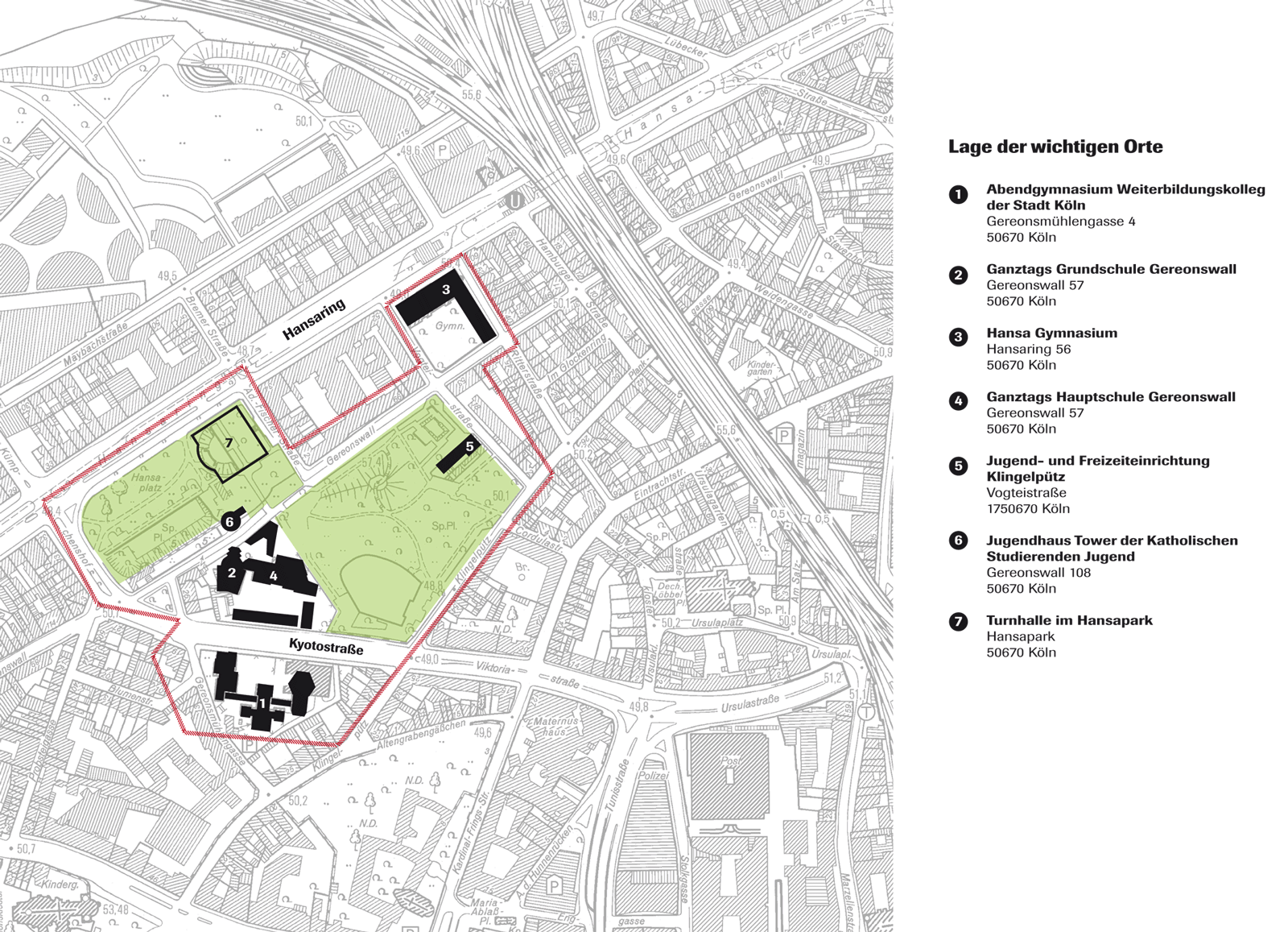 Lageplan Bildungslandschaft Altstadt Nord